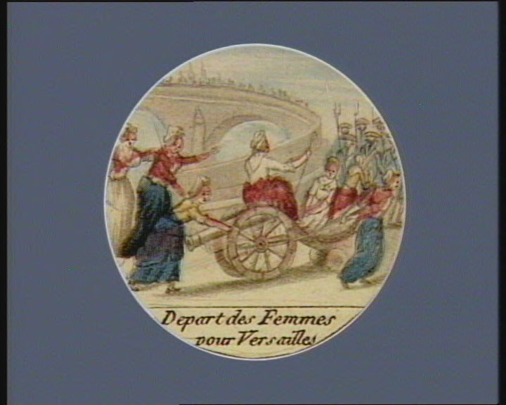 Dessus de bouton non monté. Fait partie d'une série d'une vingtaine d'estampes représentants tous les événements des 5 et 6 octobre 1789.